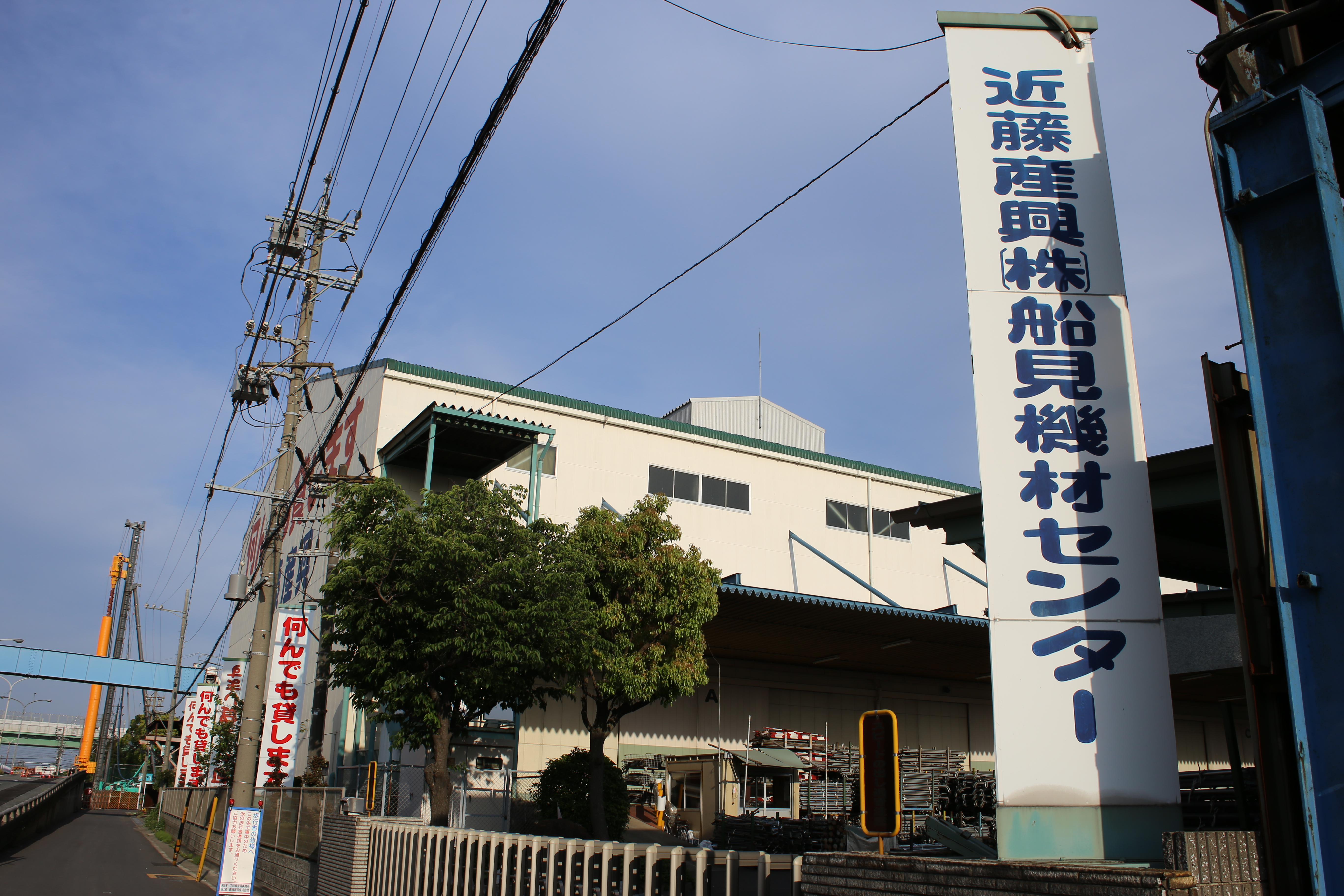 名古屋市港区船見町の近藤産興船見機材センターを北側公道西側より撮影